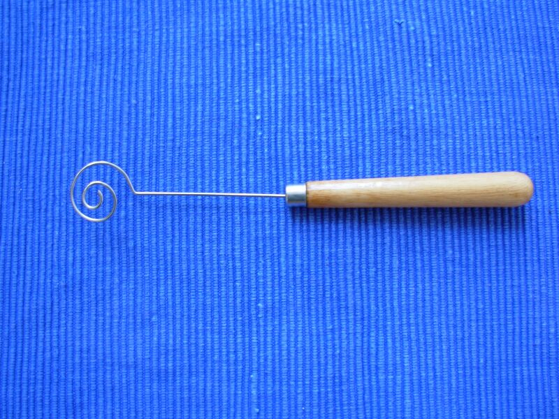 Pralinengabel auf blauem Set